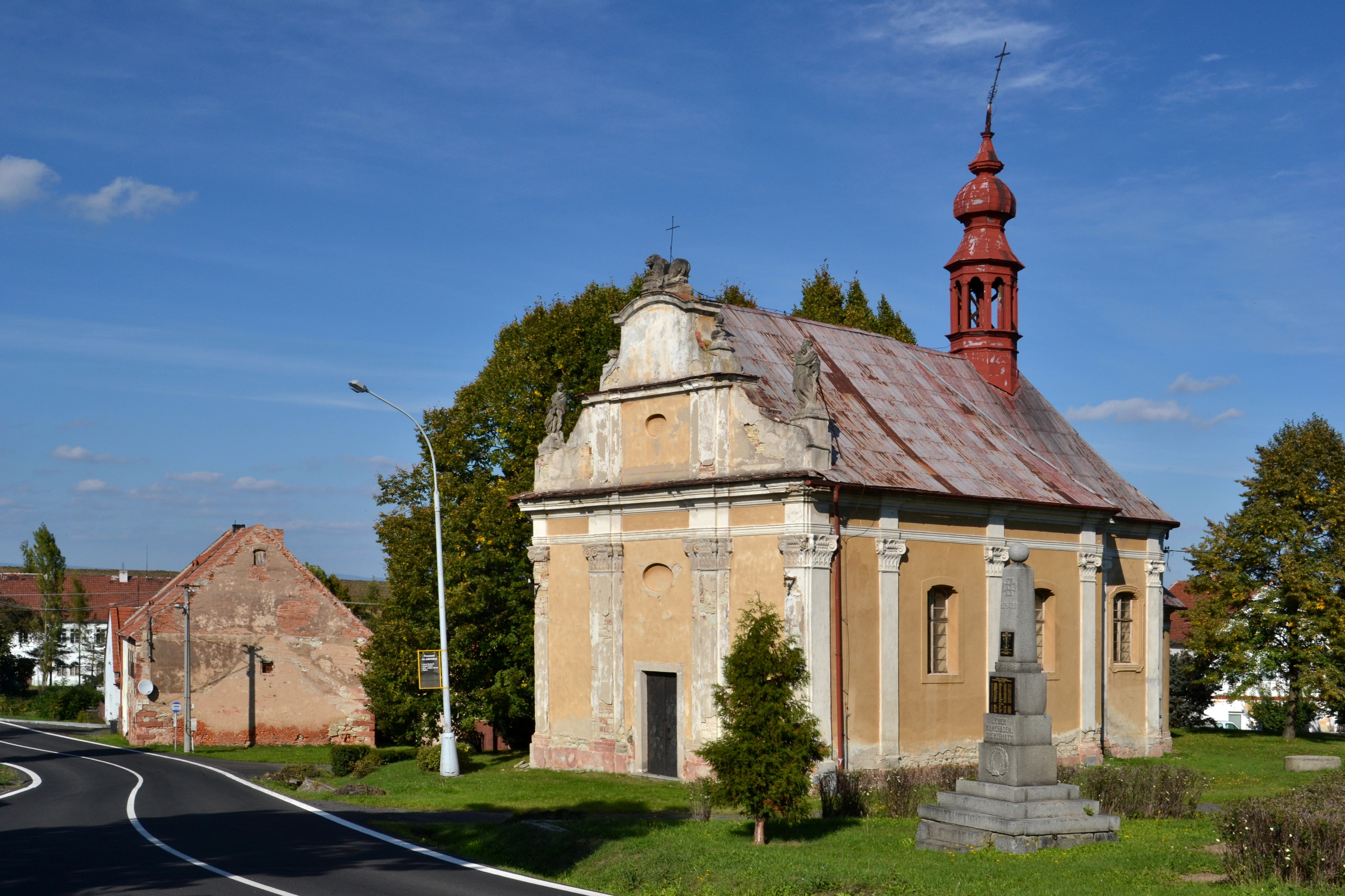 Široké Třebčice - kostel Povýšení svatého Kříže